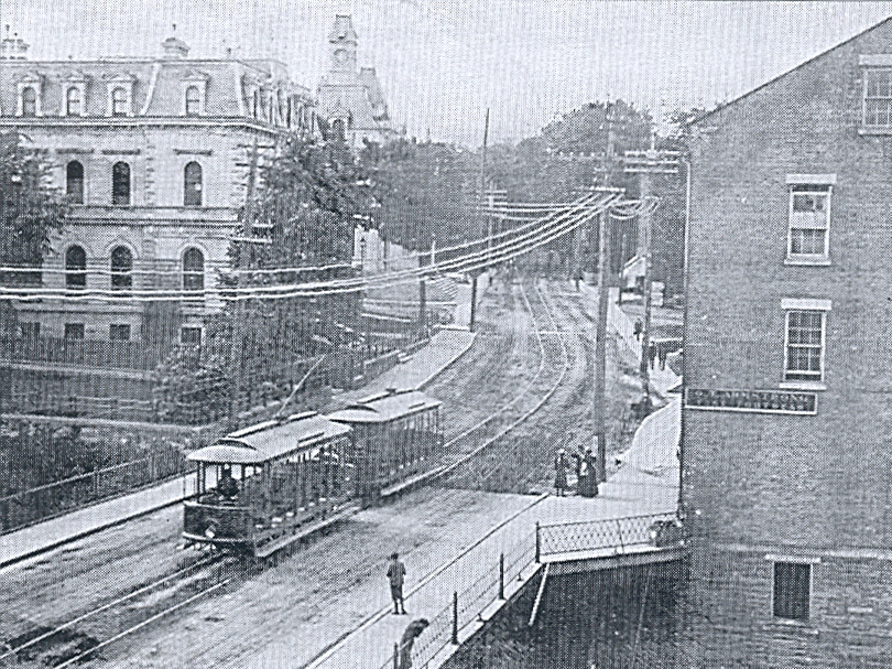 Voitures d'été du tramway sur les lignes Belt et Lennoxville, 1898